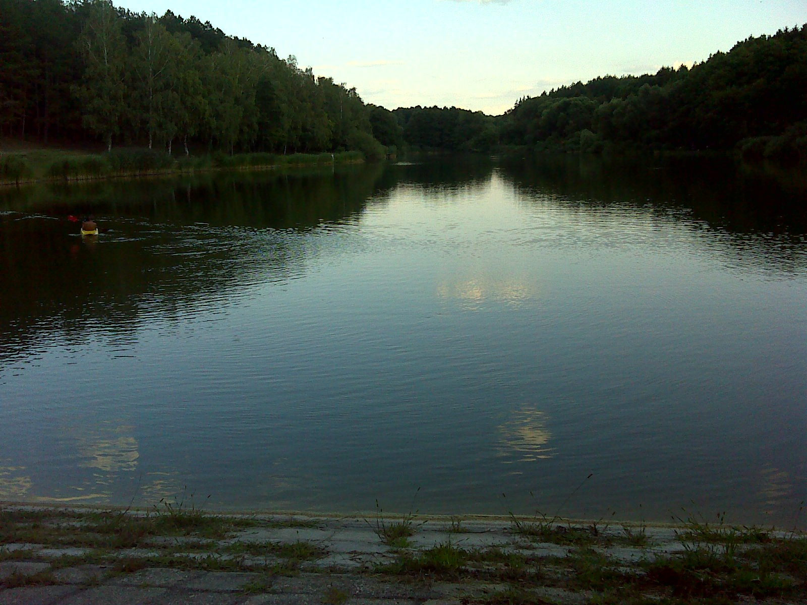 Nyírjesi horgász tó